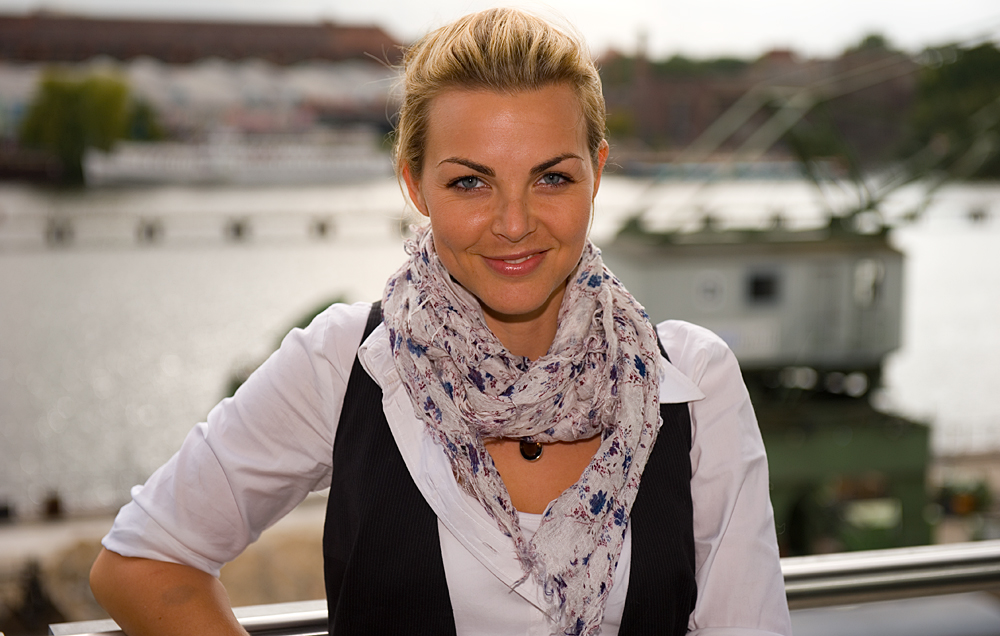 Annika Kipp, Moderatorin, Das Sat.1 Magazin, Berlin, Osthafen